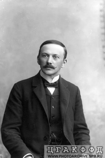 Депутат Четвертой Государственной думы от Келецкой губернии В.Ф.Яронский.